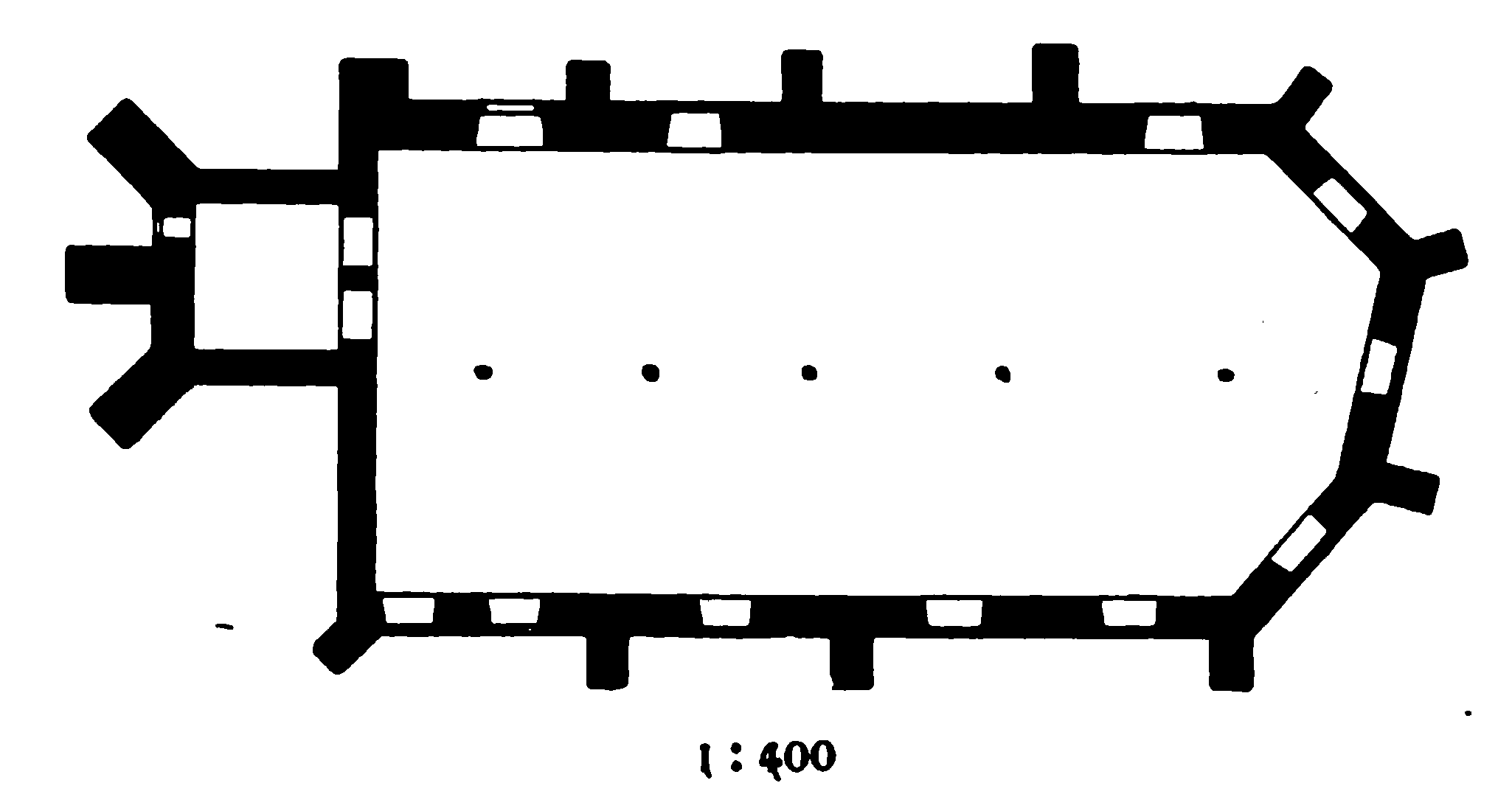 Grundriss der Ev. Kirche in Eisbergen, Stadt Porta Westfalica